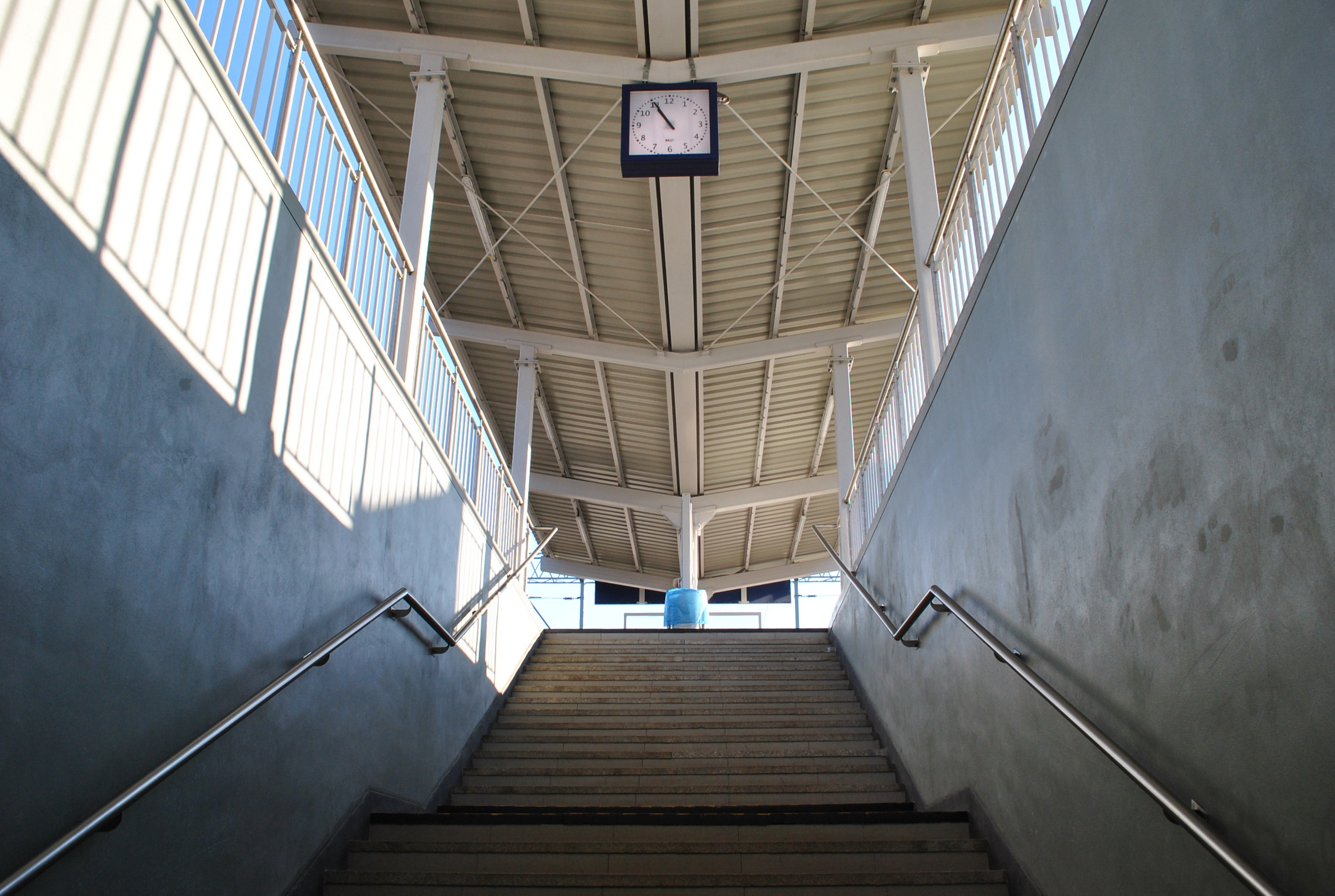 Przystanek kolejowy Katowice Załęże. Przejście na peron